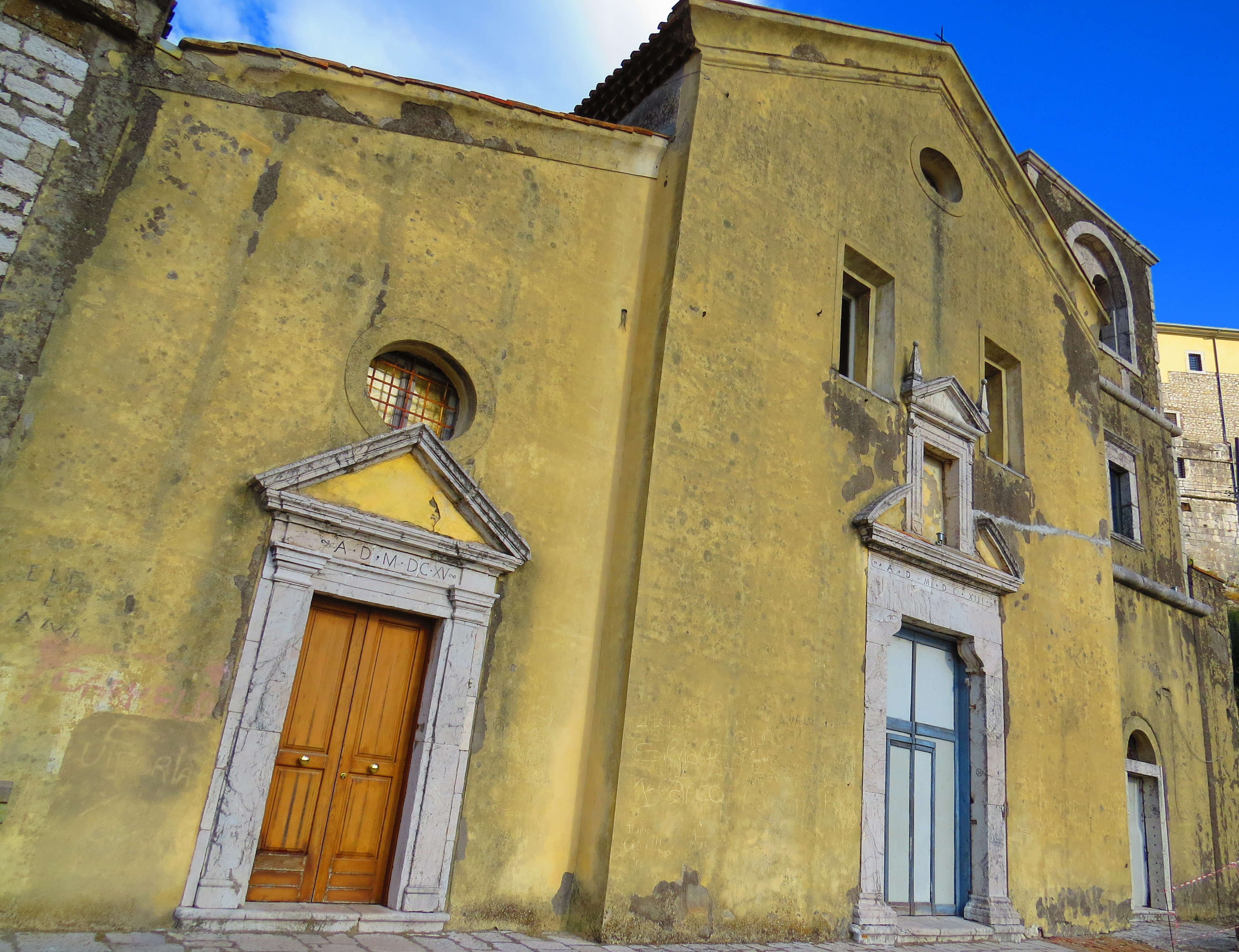 Chiesa di San Nicola nel quartiere Latovetere, Montesarchio (BN)